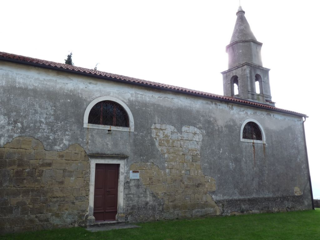 Cerkev sv. Andreja v Koštaboni